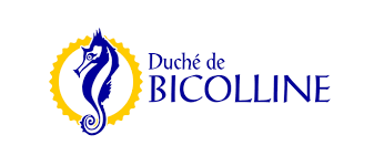 Logo de l'organisation du Duché de Bicolline à Saint-Mathieu-du-Parc